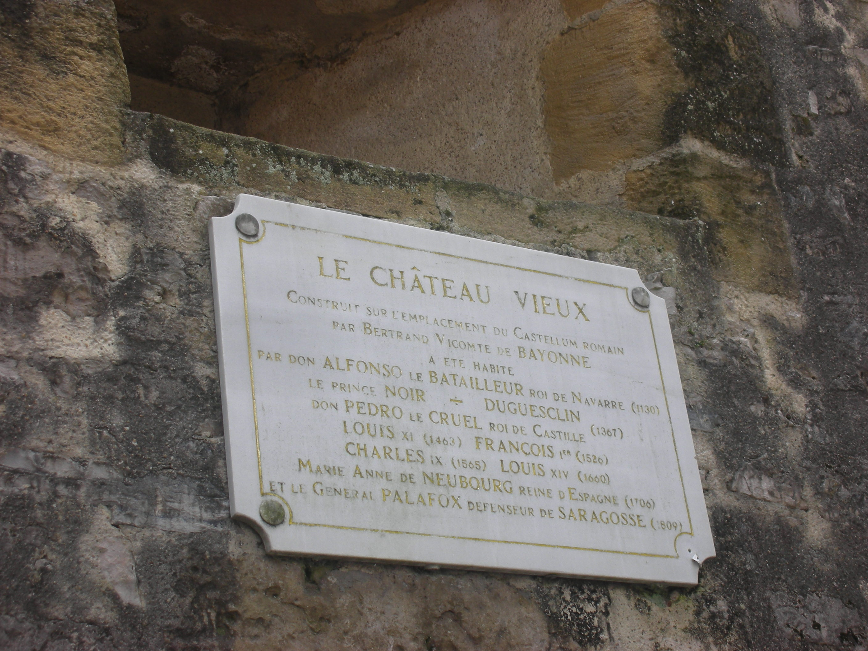 Placa conmemorativa en el Château Vieux de Bayona